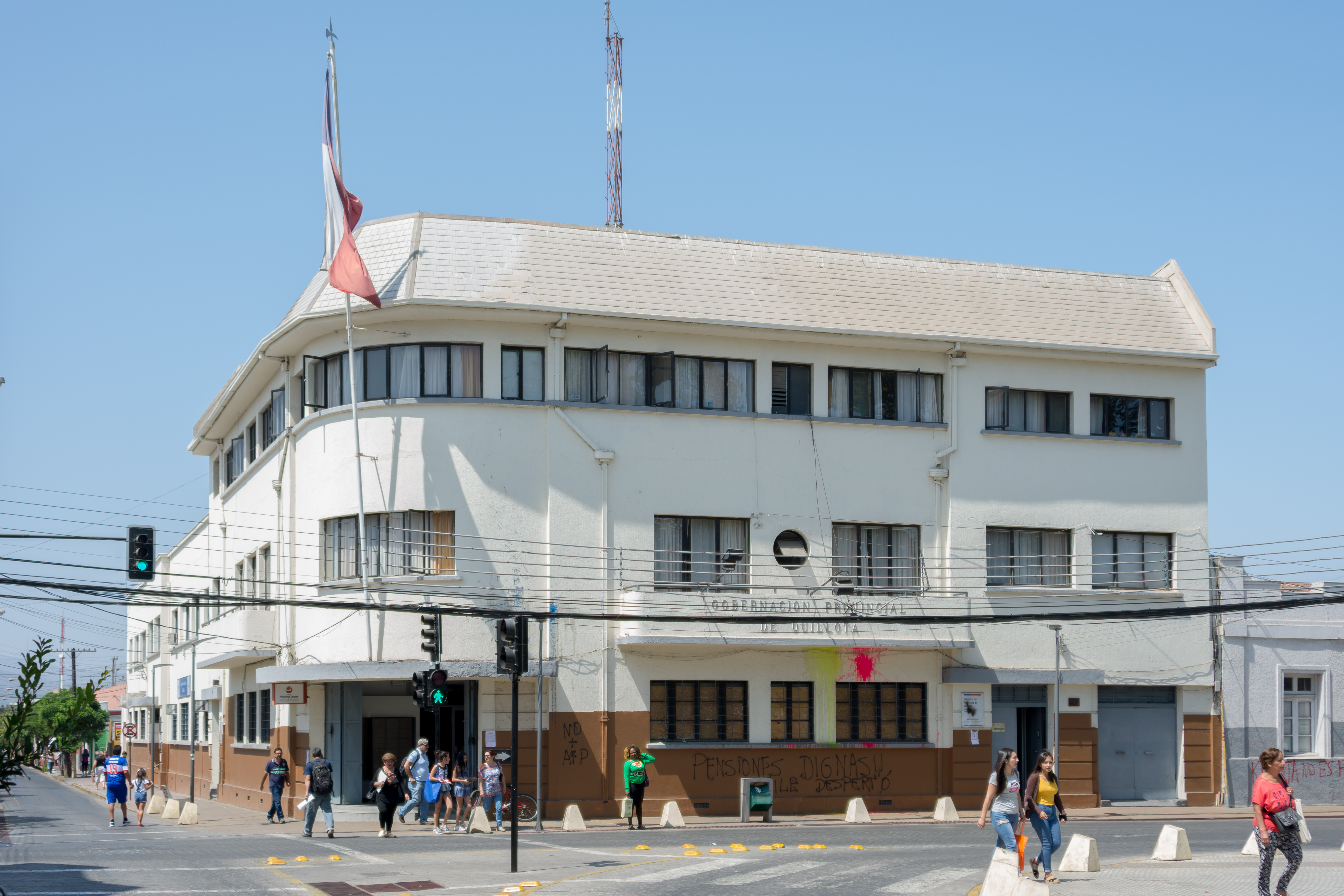 Edificio Gobernación Provincial de Quillota, Quillota, Región de Valparaíso, Chile